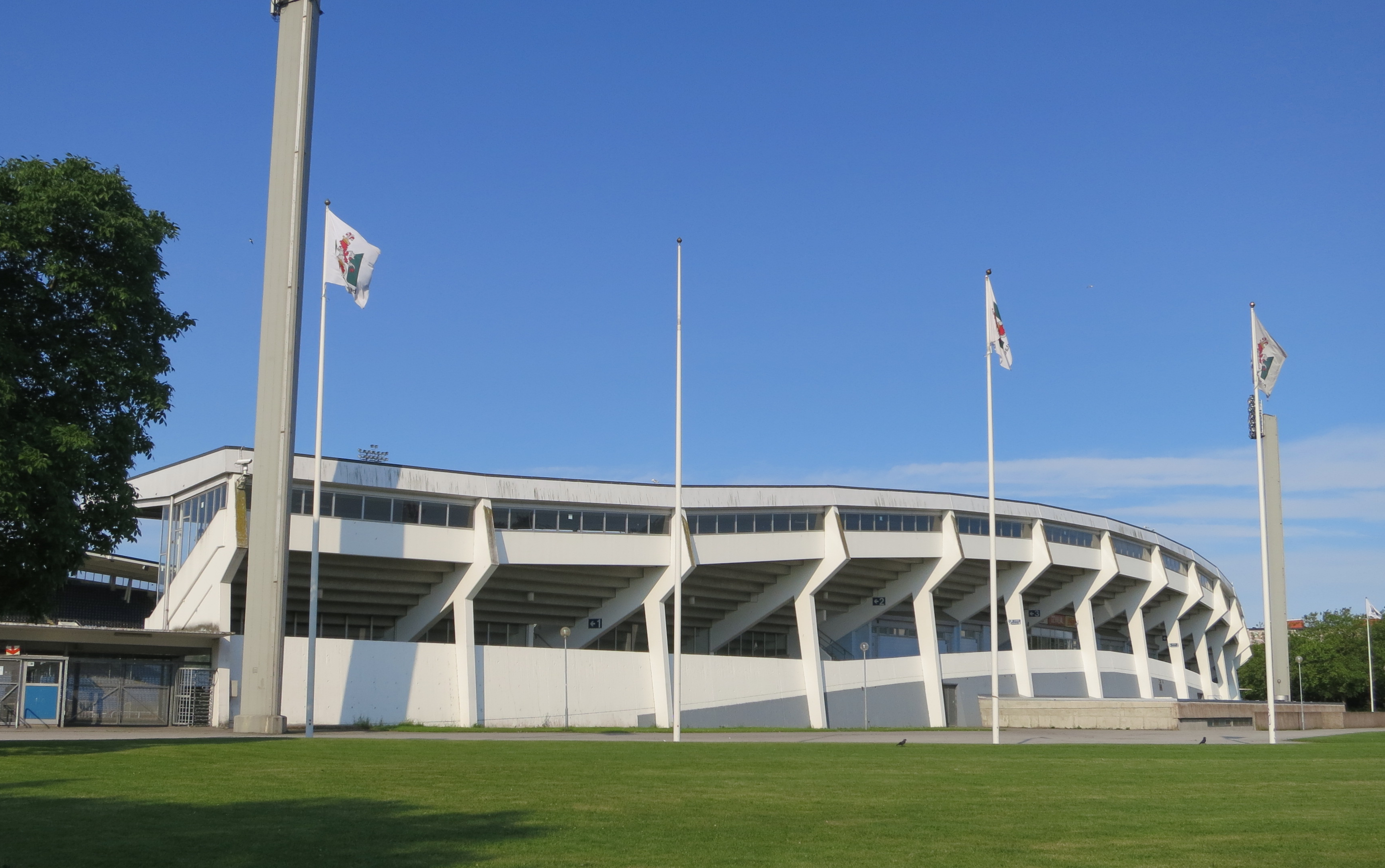 Norra läktaren på Malmö stadion